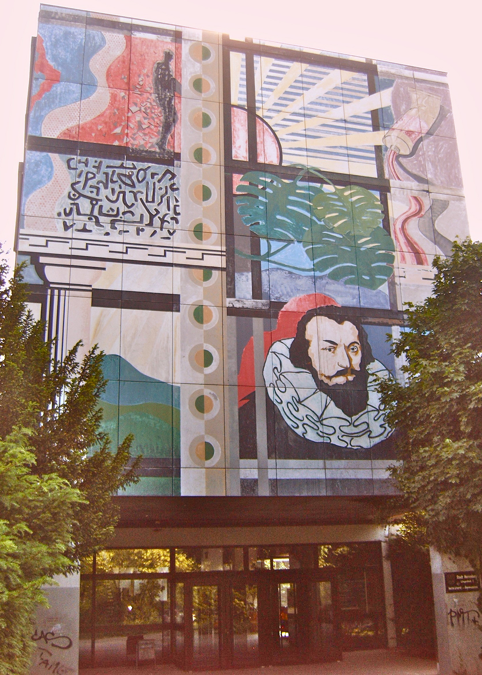 Schickhardt-Gymnasium Herrenberg: 1992 gestalteter Eingang